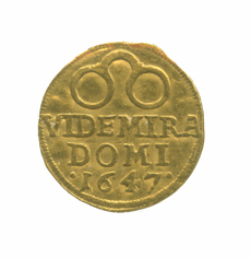 Brilledukat, dansk gullmynt